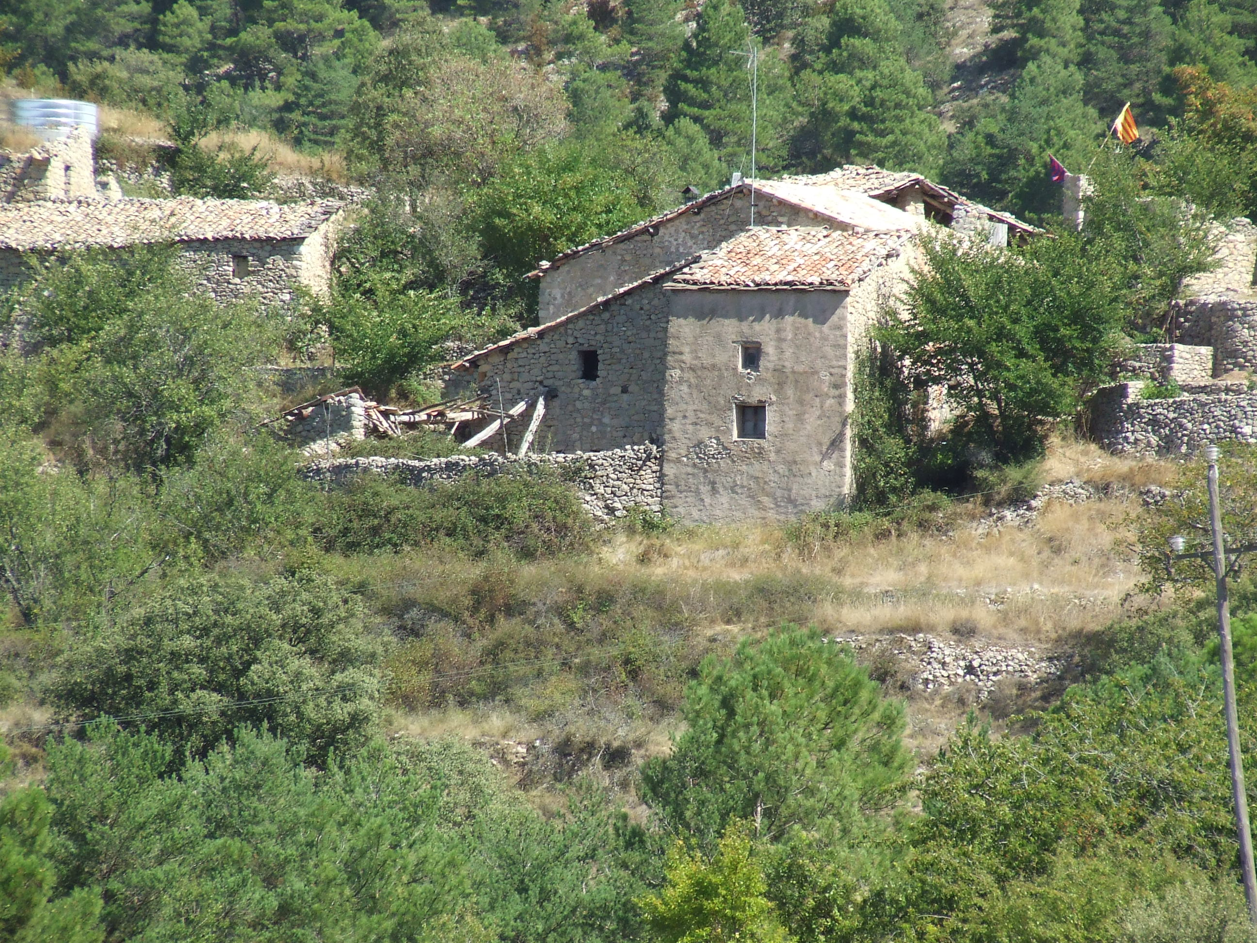 Cal Ramon (la Torre d'Eroles, Abella de la Conca, Pallars Jussà)